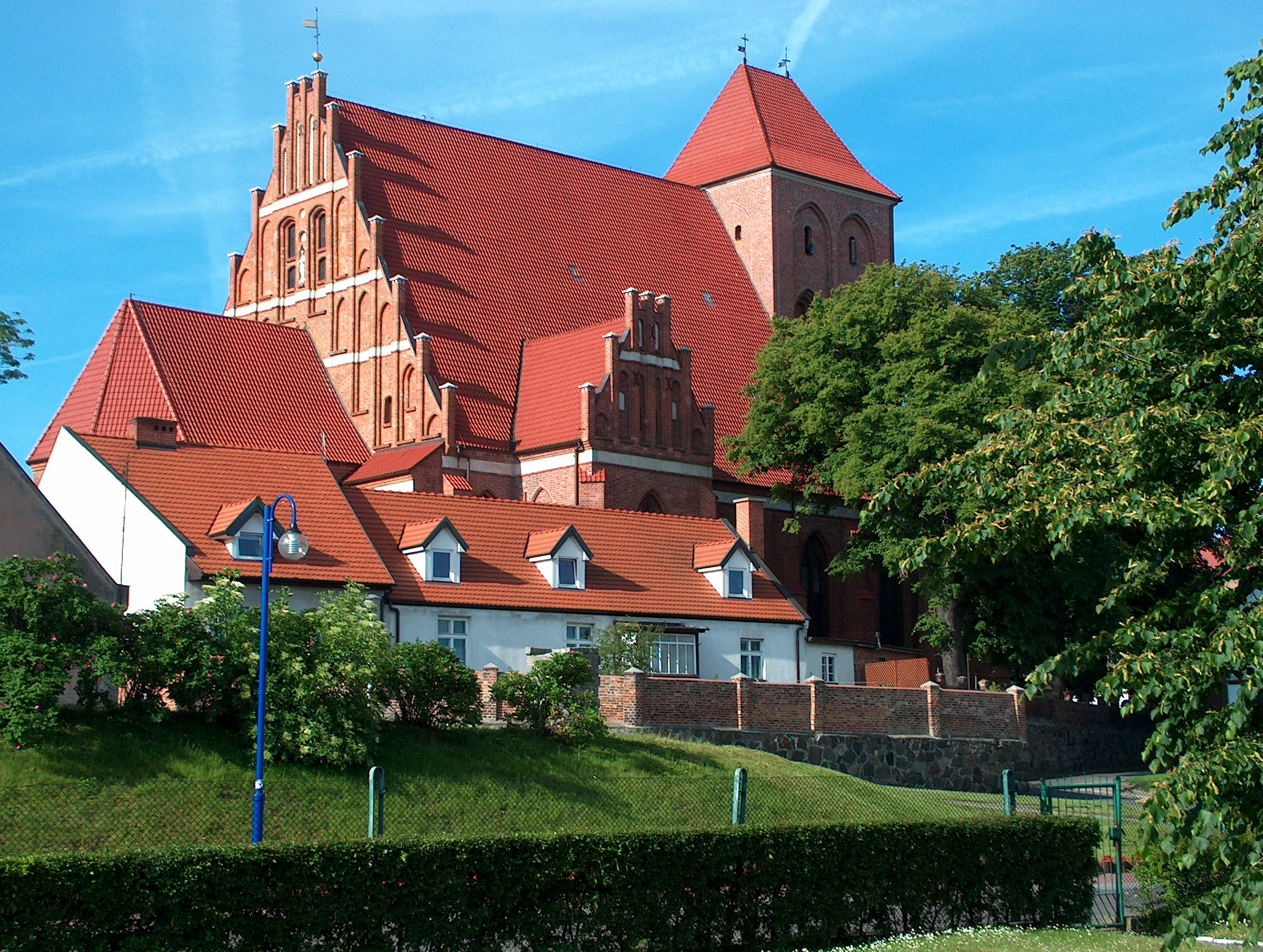 Puck, kościół par. p.w. śś. Piotra i Pawła, 1283, XIV, XVII